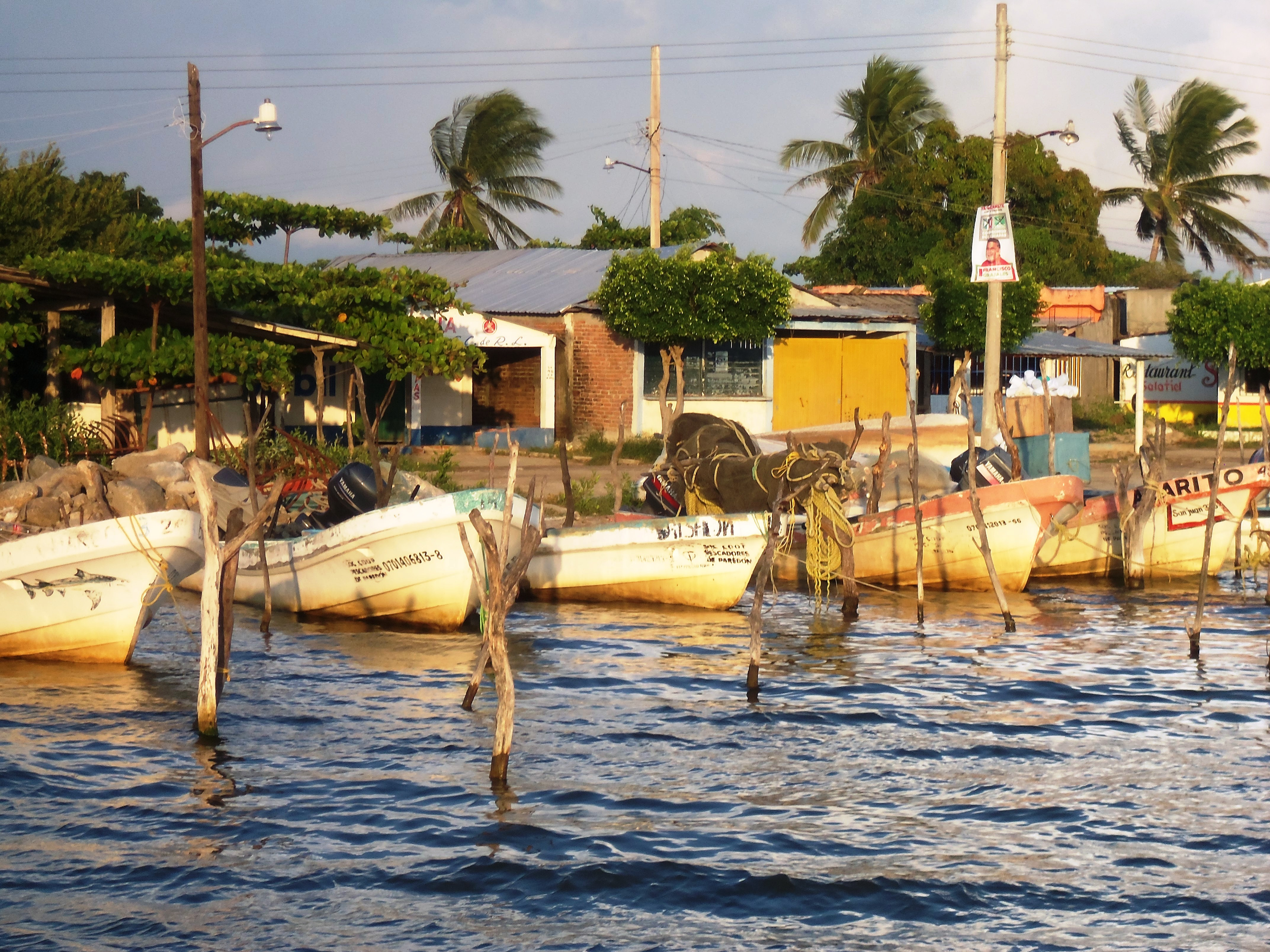 Lanchas en la "Orilla" del Mar de la localidad de Paredón.